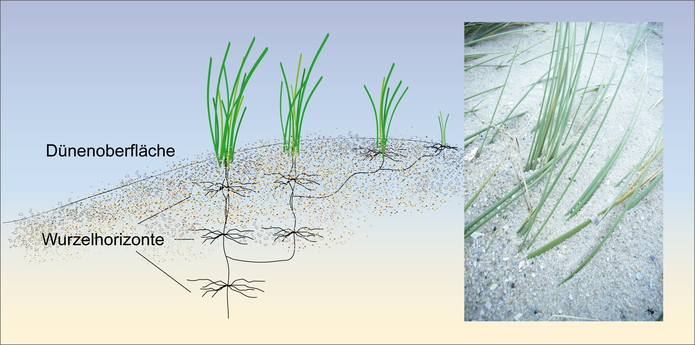 Ammophila arenaria; Wurzelstockwerke in Dünen